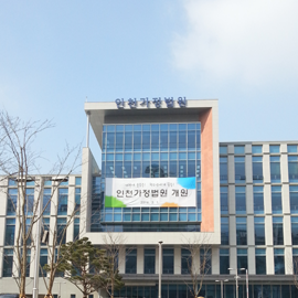 인천가정법원